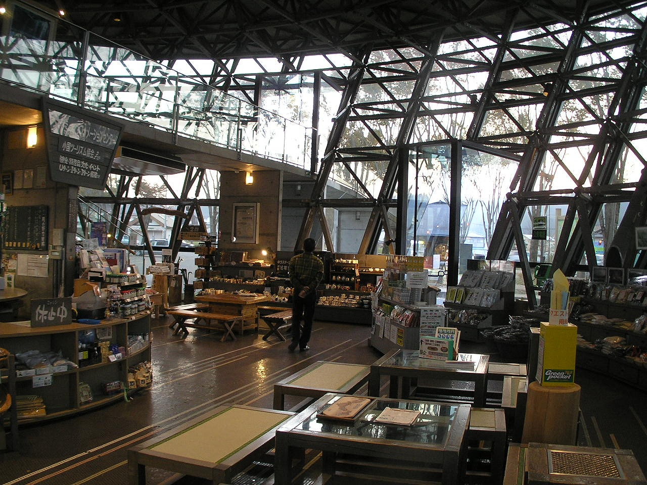 道の駅小国熊本県阿蘇郡小国町の国道387号及び路線に重複する国道442号上にある道の駅